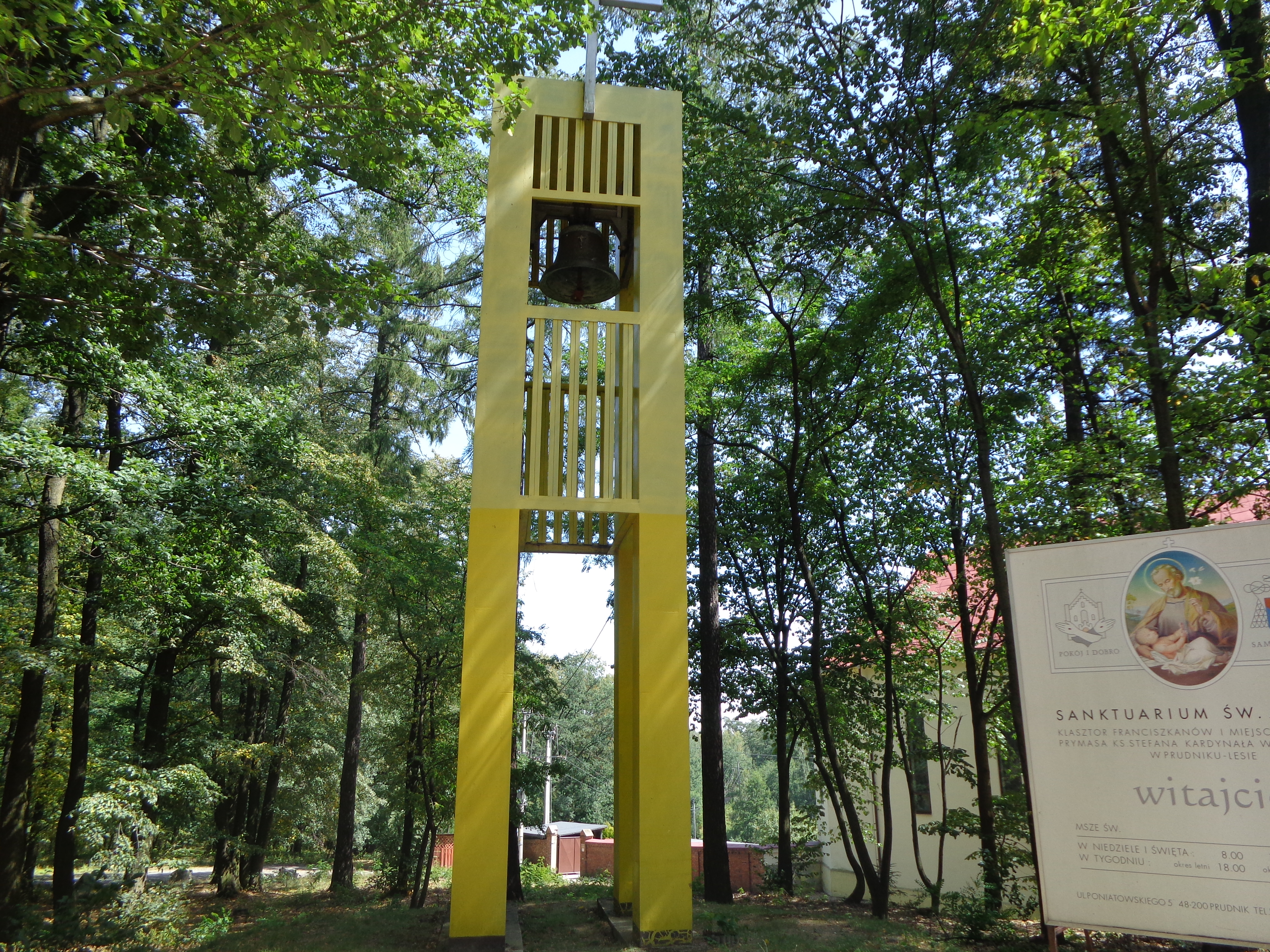 Dzwon elektroniczny należący do sanktuarium św. Józefa w Prudniku-Lesie.